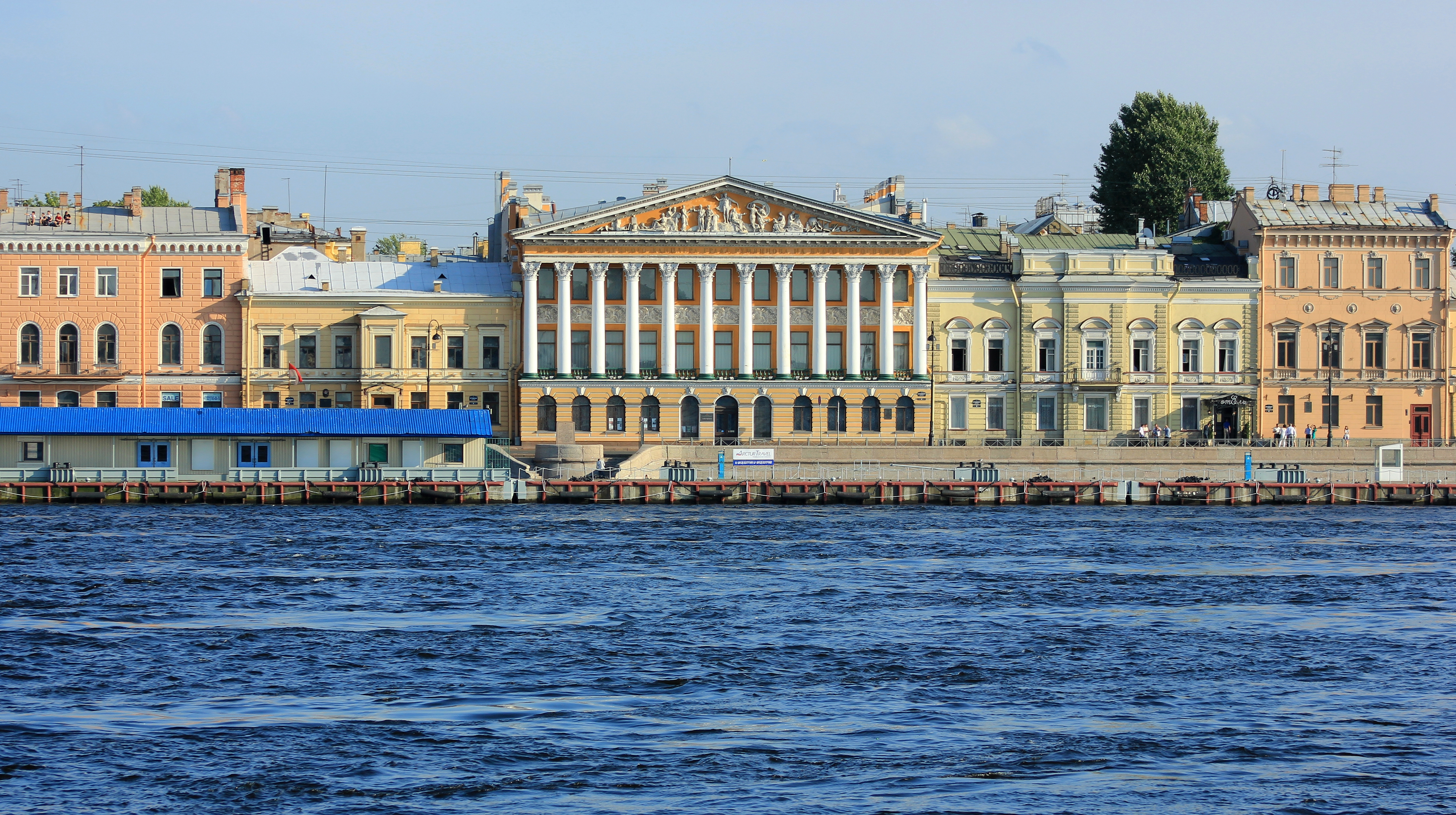 Английская набережная Невы. Санкт-Петербург. Россия. В центре снимка дом Румянцева Н.П. (Кочубея Е.Л.)